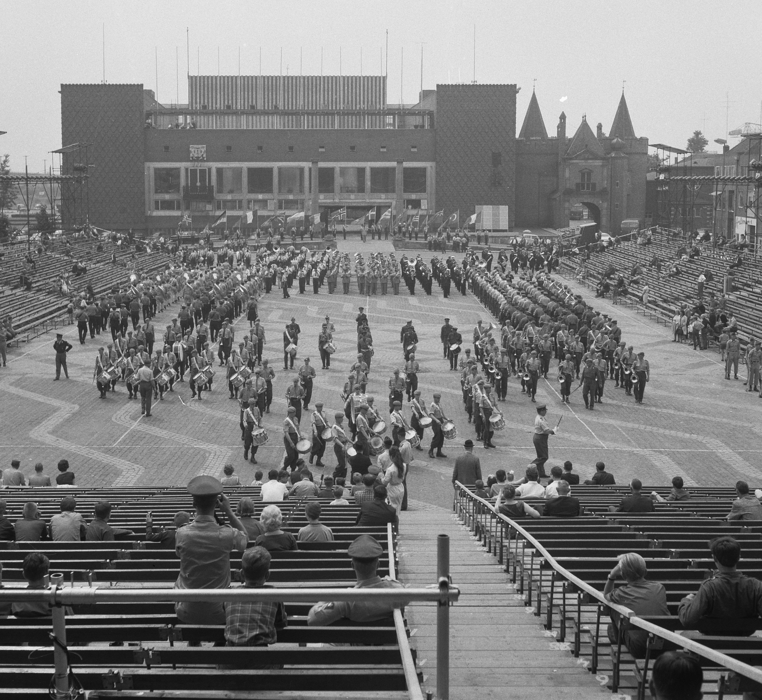 Galarepetitie Natotaptoe, overzicht repetitie te Arnhem op het plein voor het Provinciehuis